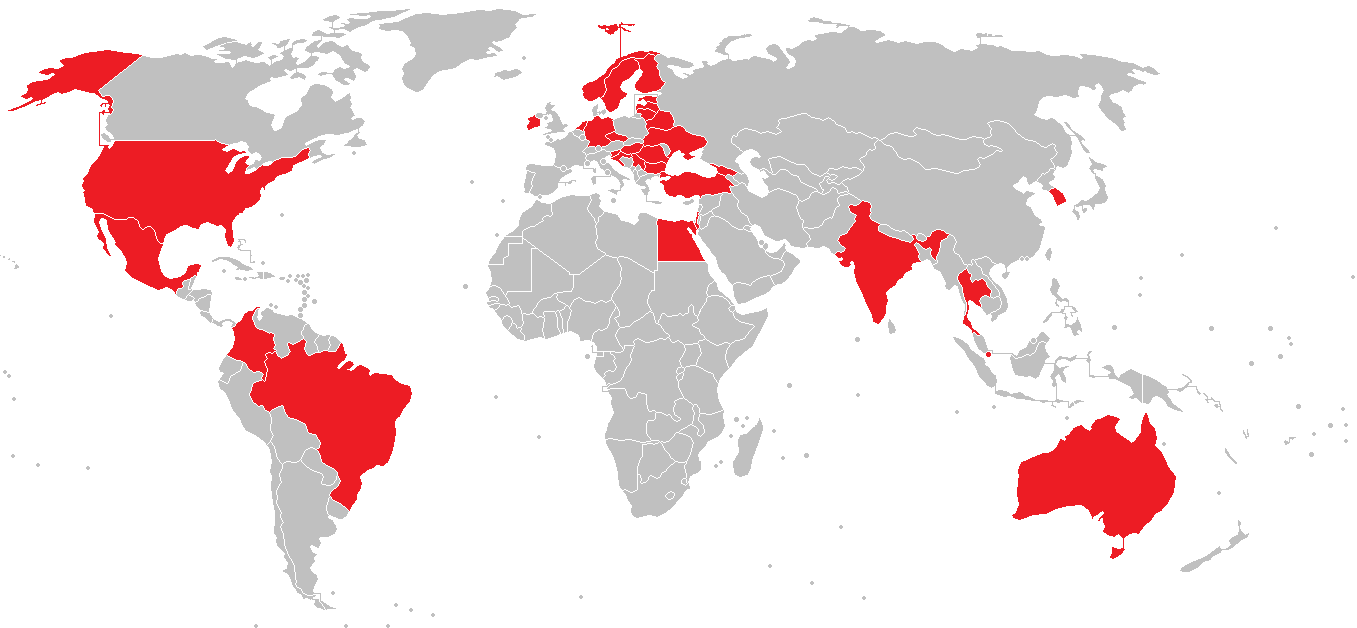 الدول التي تستعمل نظام الاشتباك بالليزر المتعدد والمتكامل في قواتها المسلحة.